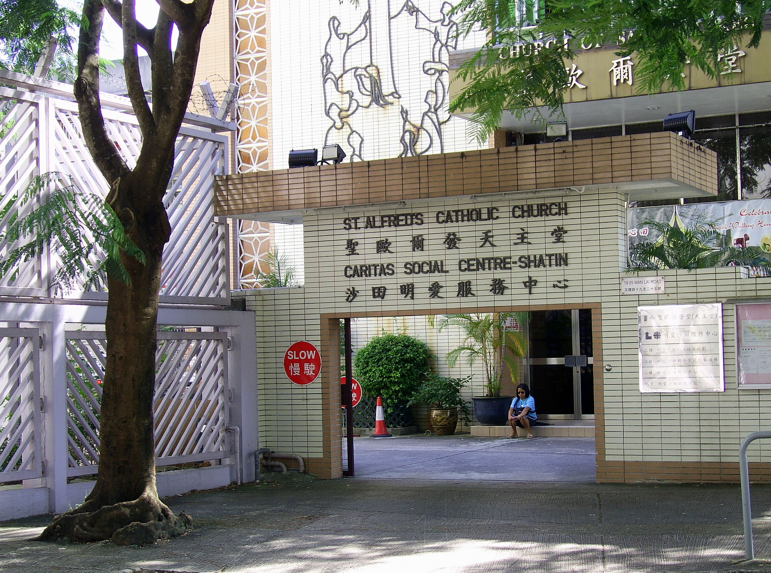 中文（香港）: 沙田明愛服務中心